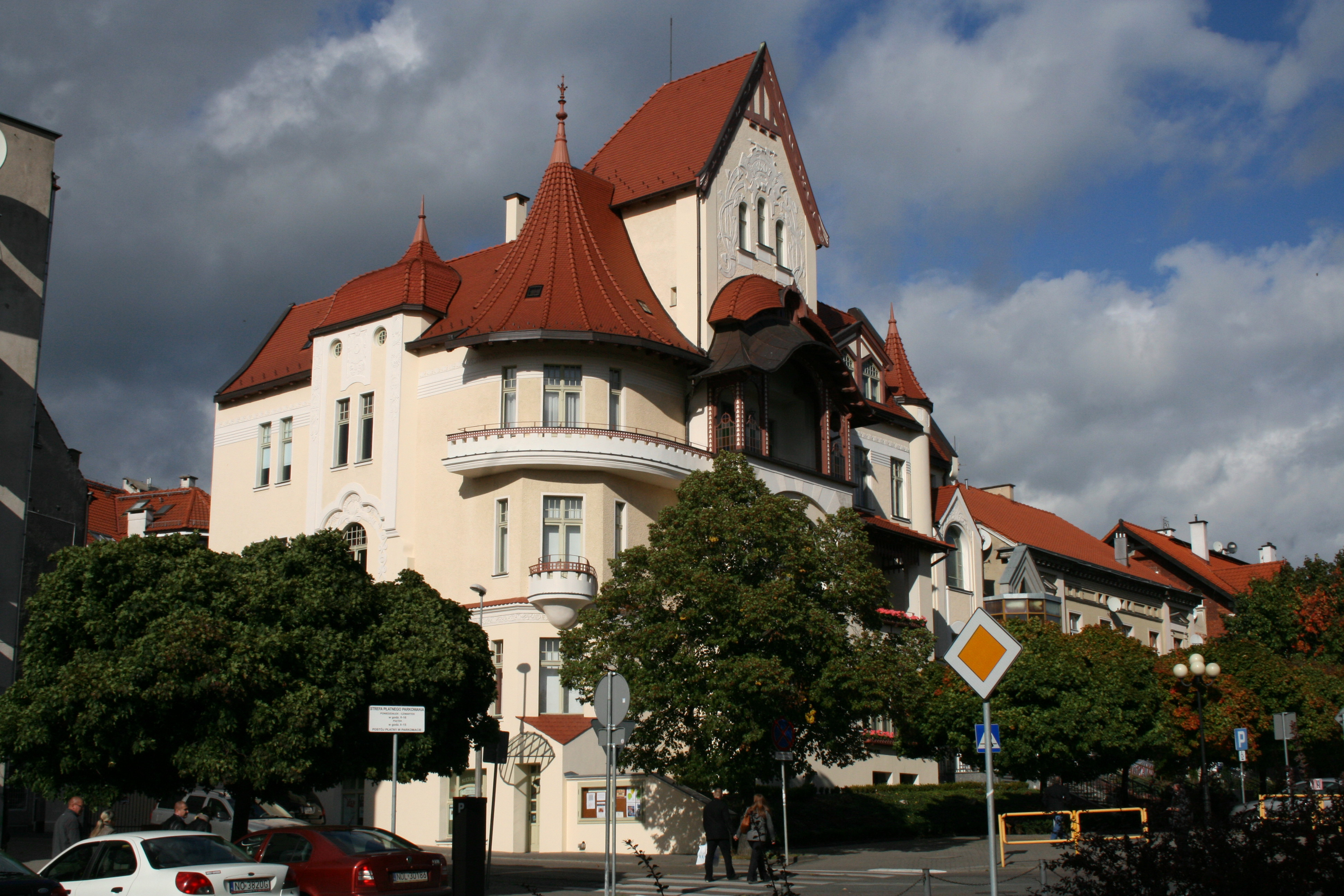 Olsztyn, ul. Dąbrowszczaków 3 - willa secesyjna, obecnie siedziba Miejskiego Ośrodka Kultury (zabytek nr A-2660)